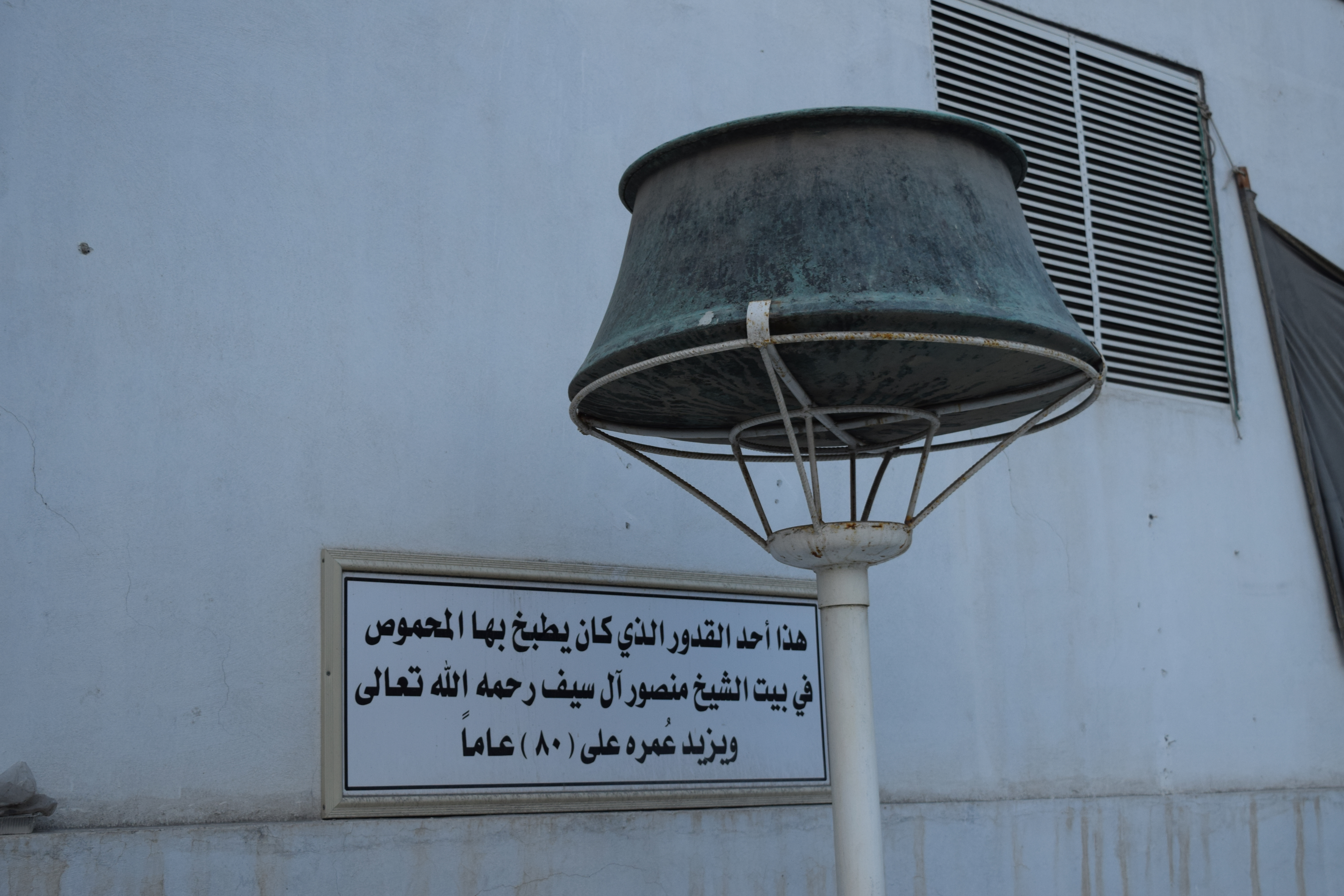 أحد القدور التي كان يُطهى فيها عيش المحموص في مأتم آل سيف، يعود عمر القدر إلى عشرينات القرن التاسع عشر الميلادي. يعود تاريخ المأتم إلى ما قبل 12 سنة ويقع في الديرة بتاروت بينما تقع حسينية آل سيف في الدشة بتاروت. يُعتقد أن وجبة المحموص قد نشأت في حسينية آل سيف.